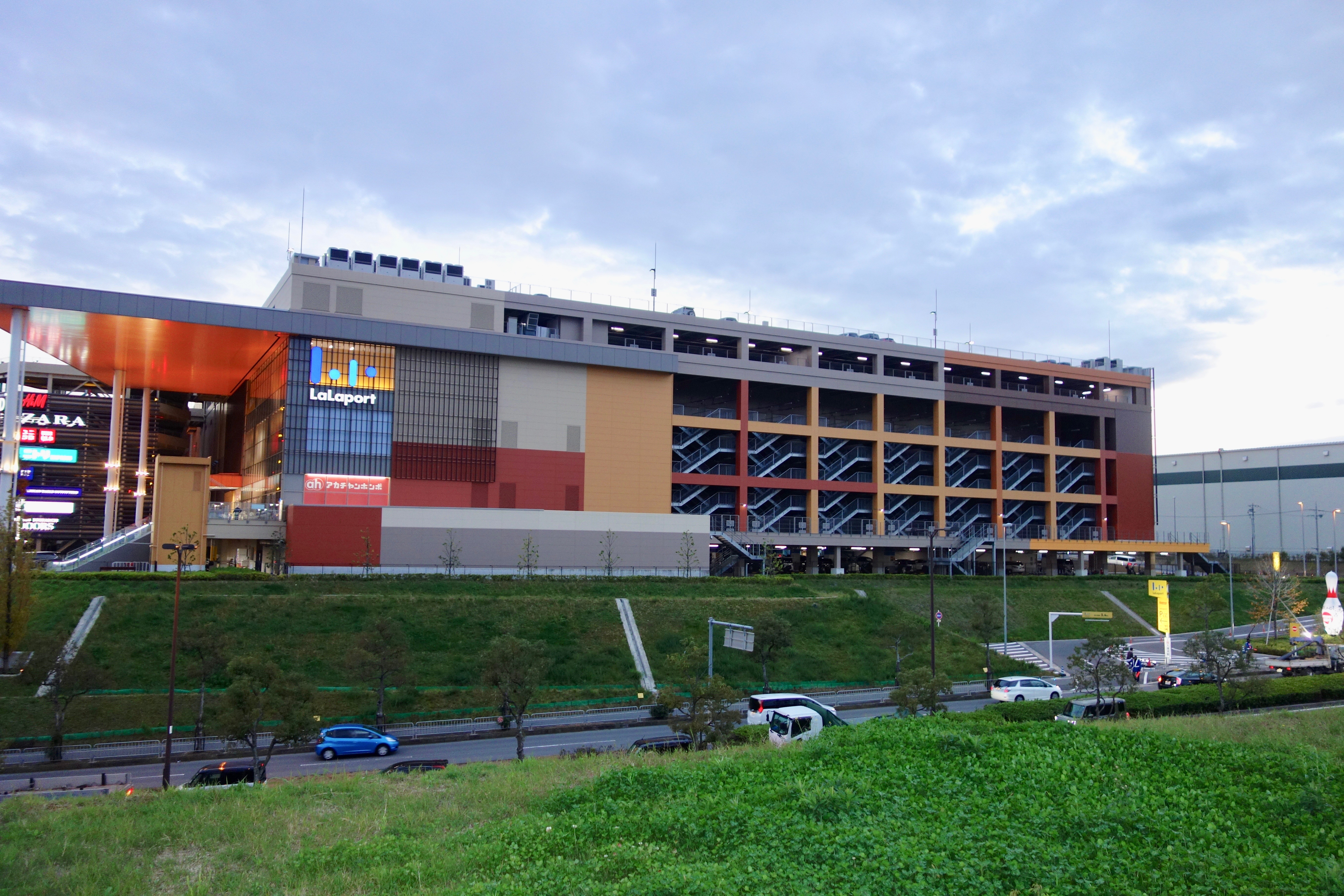 ららぽーと和泉全景横面